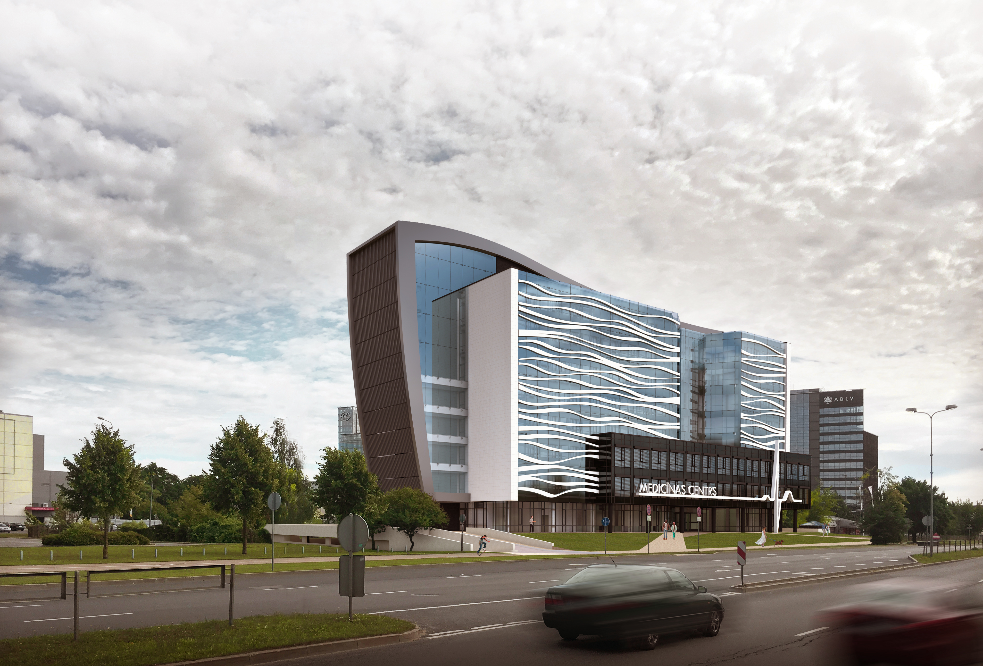 Medicīnas centrs